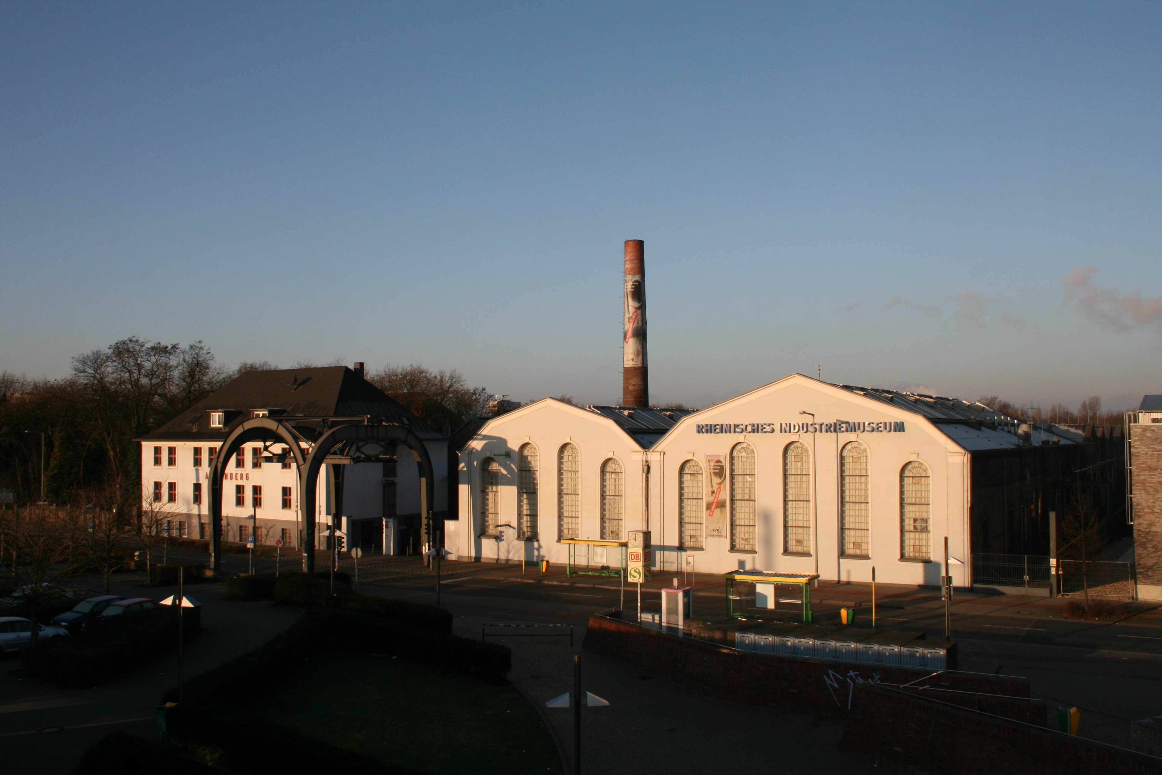 Rheinisches Industriemuseum Oberhausen - Zinkfabrik Altenberg